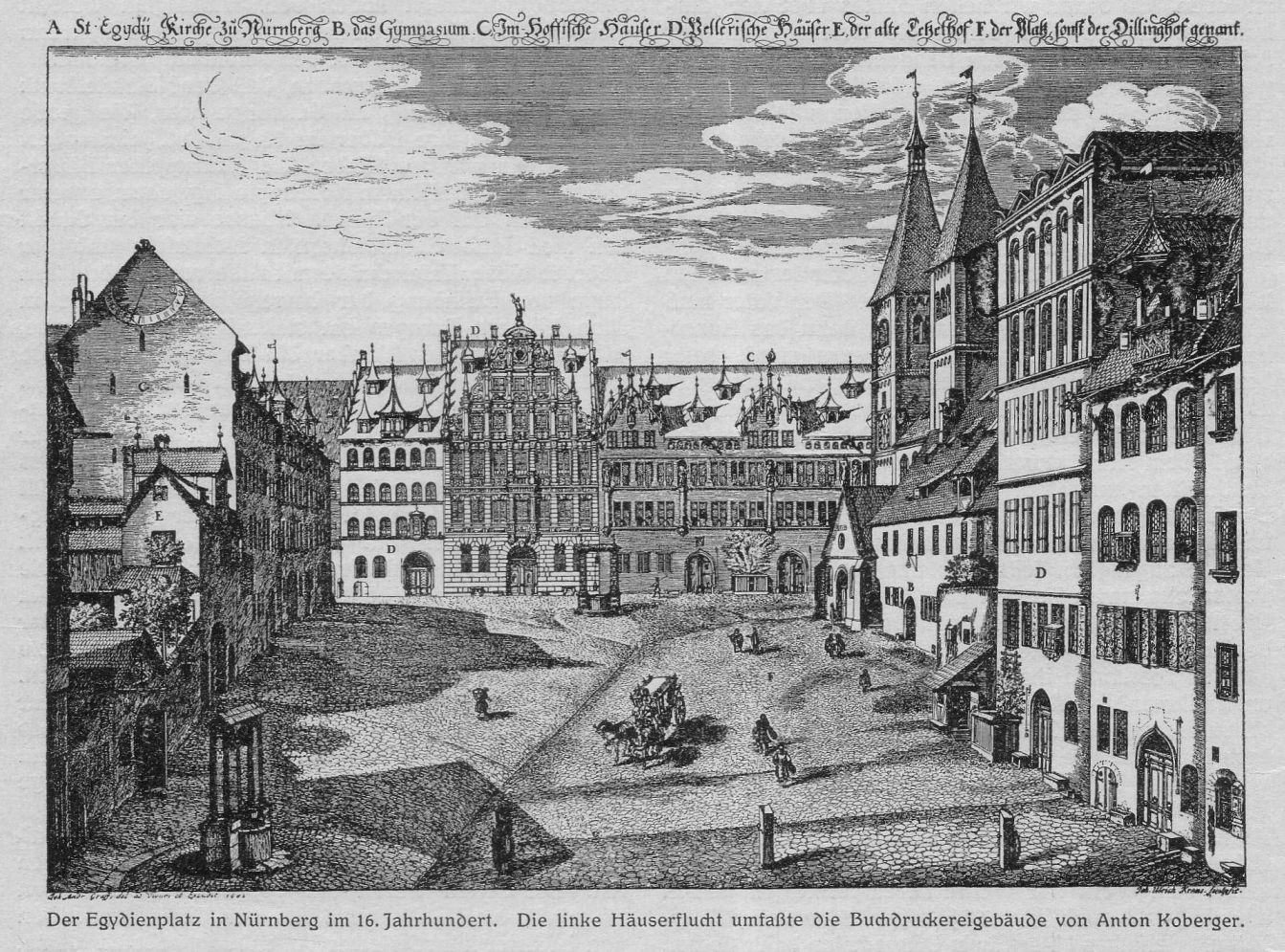 Egidienplatz in Nürnberg mit Häusern, links, die die Druckerei Anton Kobergers beherbergten